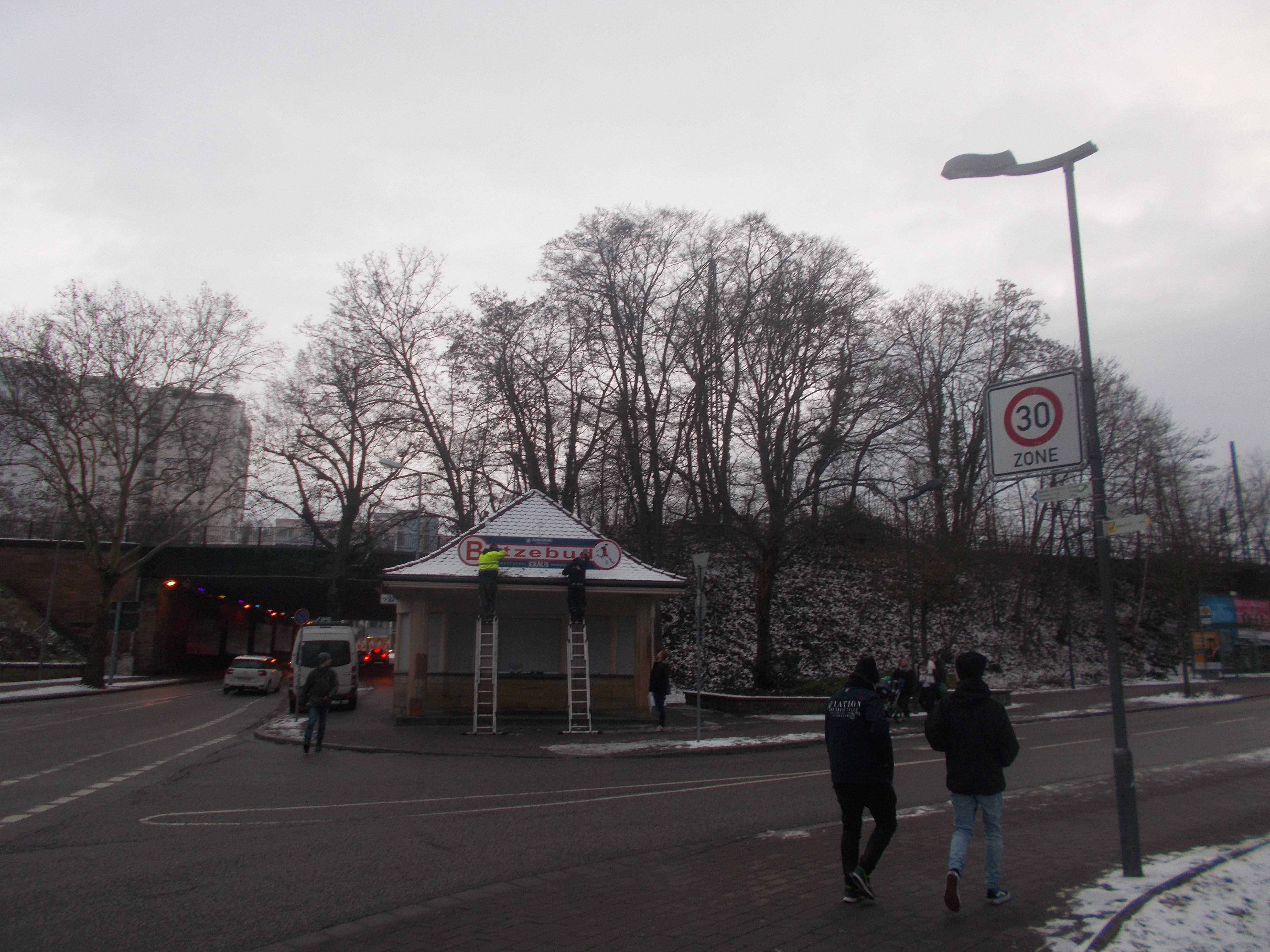 Betzebud am Philipp-Mees-Platz, ehemalige Buzzhaltestelle